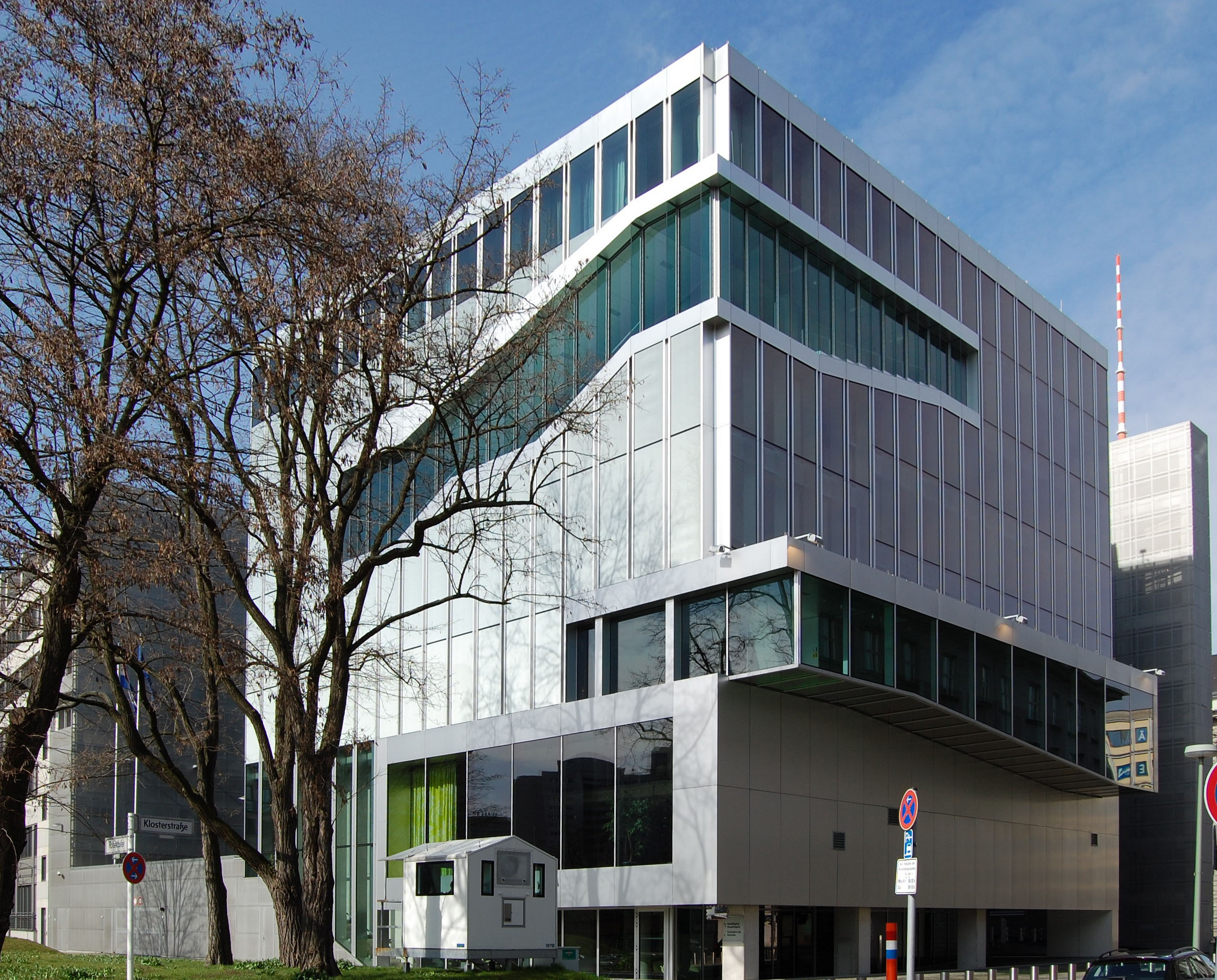 Dutch Embassy in Berlin